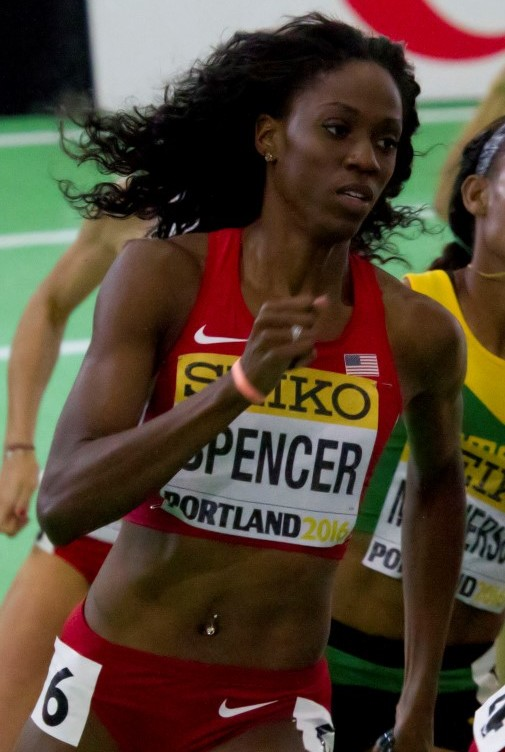 470 finale 400m dames